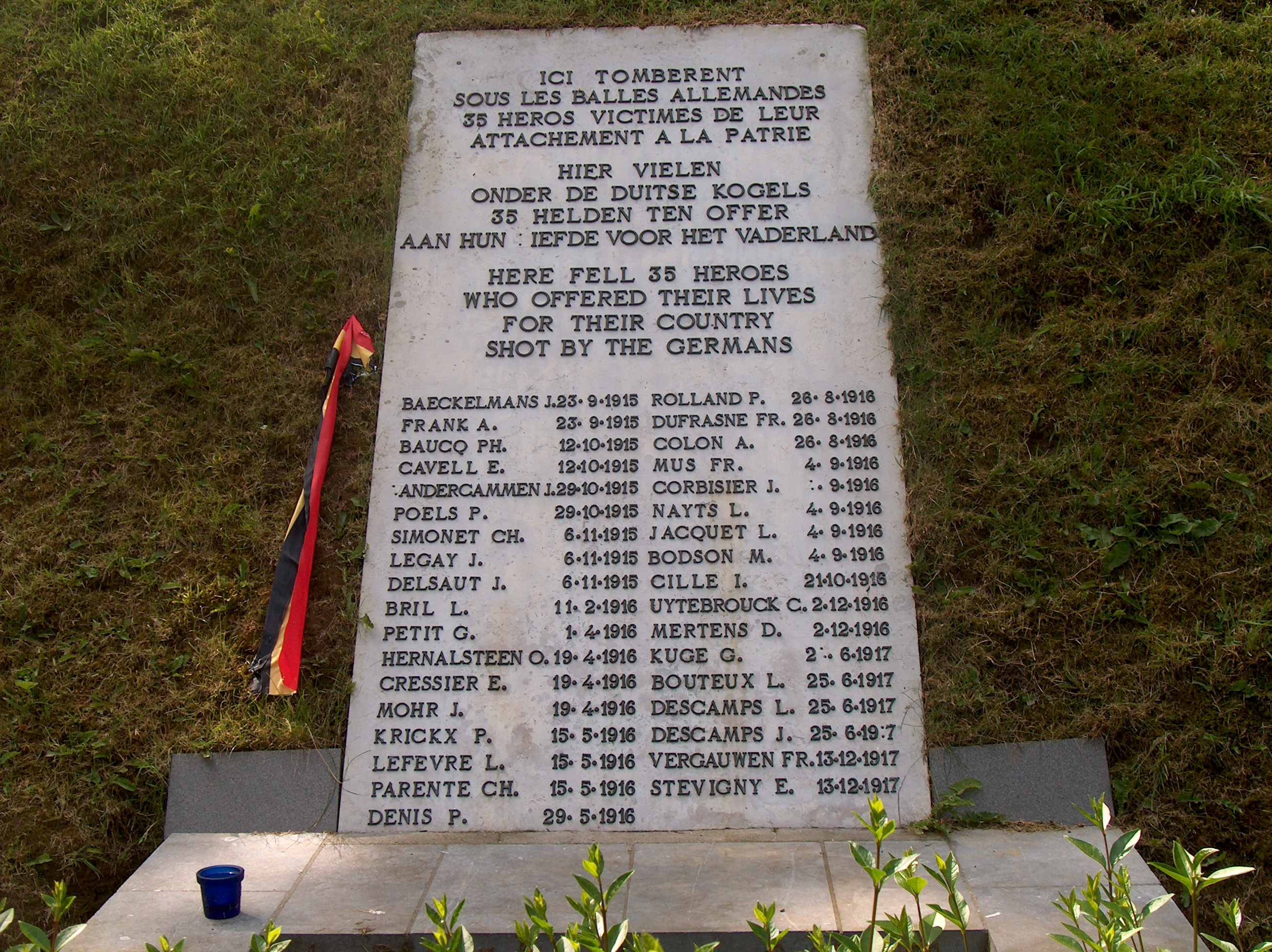 L'enclos des fusillés, rue Colonel Bourg à Schaerbeek, Bruxelles, Belgique.